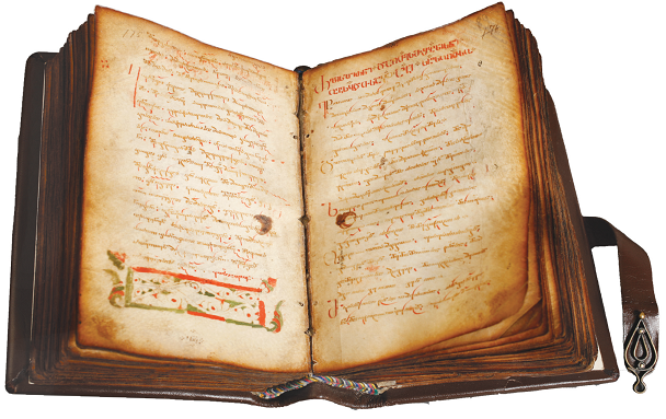 სძლისპირნი და ღვთისმშობლისანი (A-603)